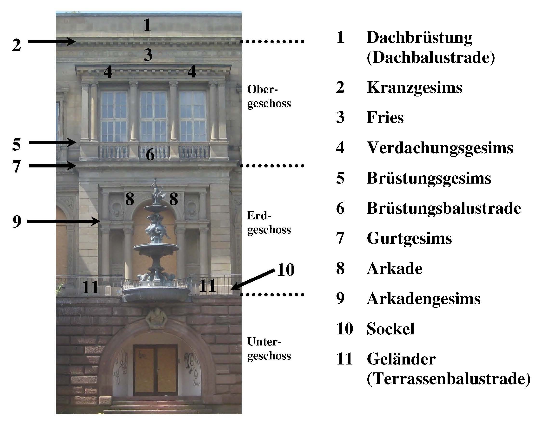 Stuttgart, Villa Berg, Fassadenstruktur.